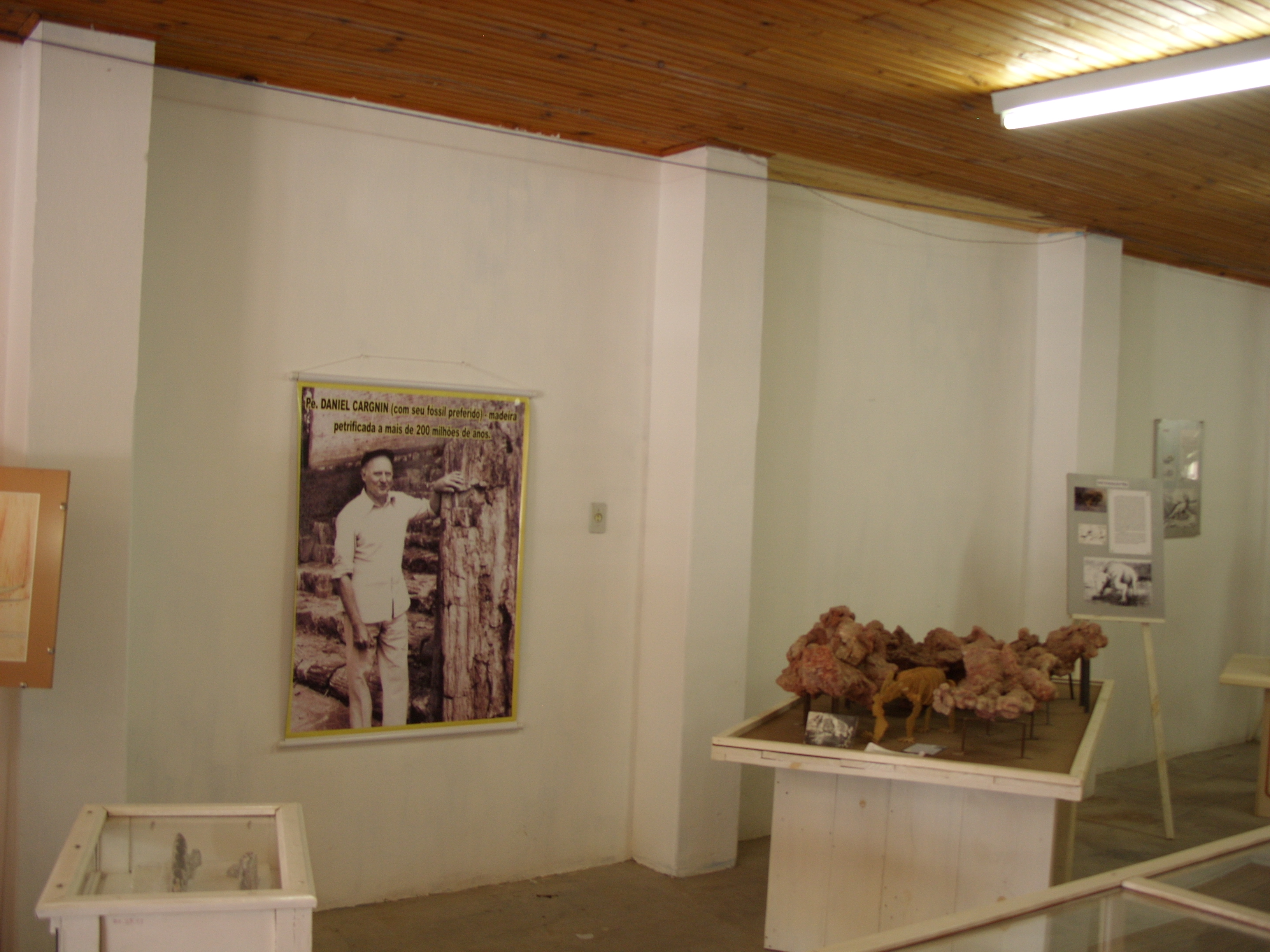 Museu Padre Cargnin localizado na cidade de Mata, Rio Grande do Sul, Brasil. Foto do Padre Cargnin.